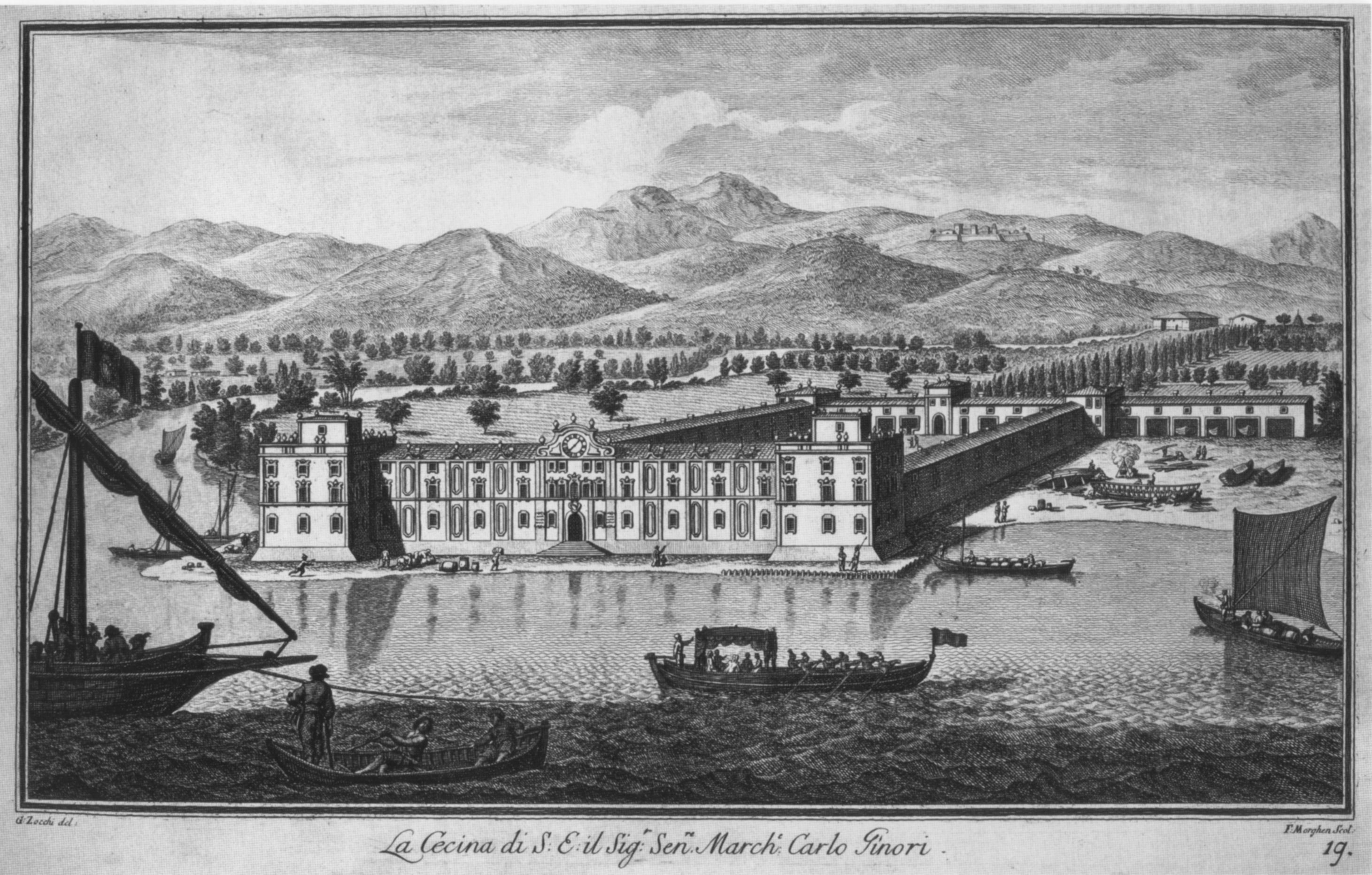 Zocchi, ville 21 ginori di cecina